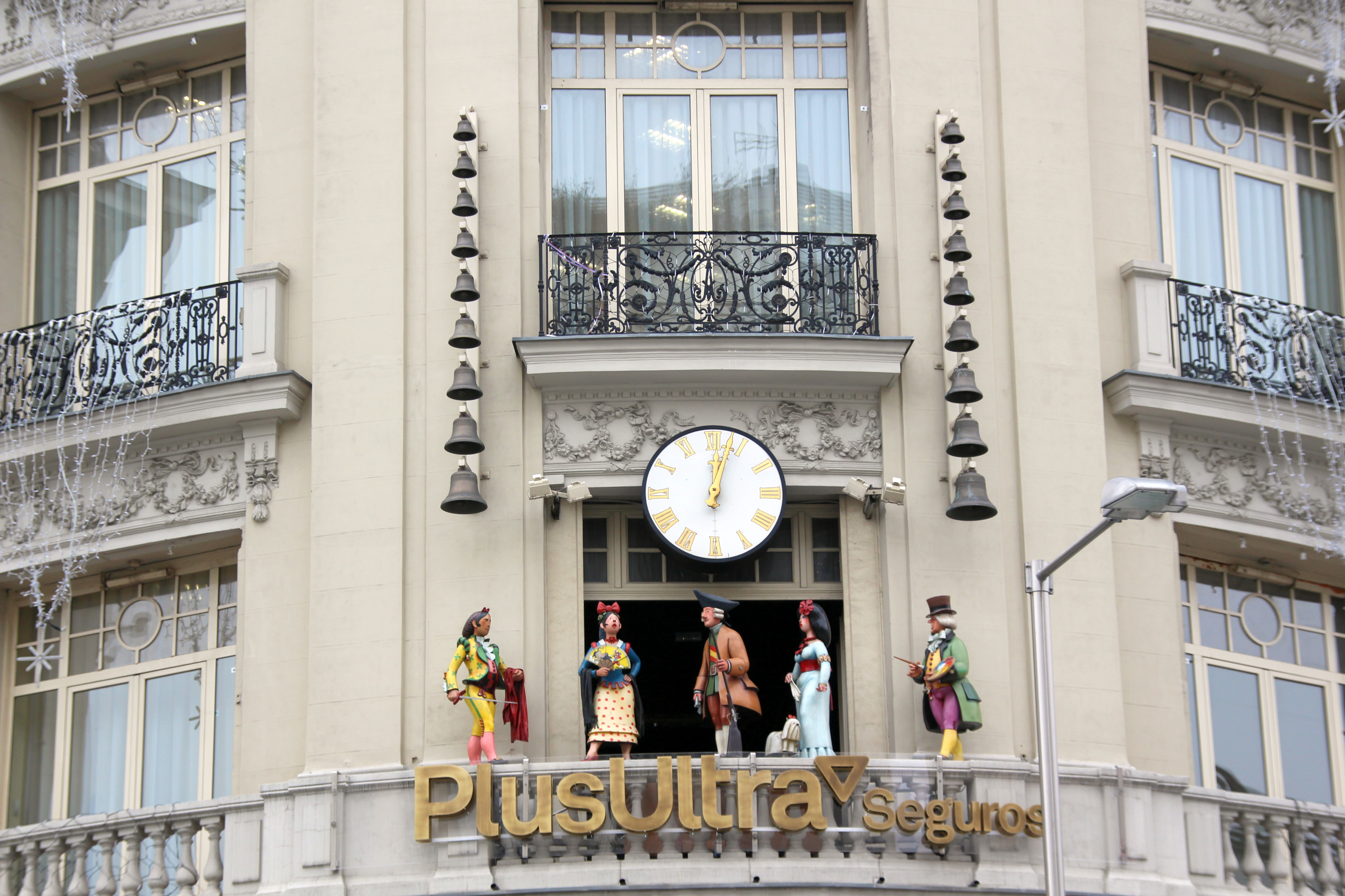 El lugar no puede ser más turístico, justo enfrente del Hotel Palace y el Congreso de los Diputados, muy cerca del Museo del Prado. El humorista Mingote se encargó de diseñar las cinco figuras que dos veces al día, a las doce de la mañana y a las ocho de la tarde, salen al balcón a bailar y saludar al compás de la música de las campanas que hay a ambos lados. Las figuras representan a los personajes más castizos de la época más famosa de la historia de Madrid, la goyesca: un torero, una maja, el Rey Carlos III, la Duquesa de Alba y el mismísimo Goya.